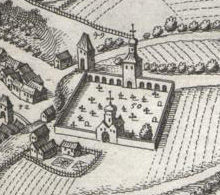 Der Taborfriedhof im 17. Jahrhundert. Hier sind noch der ehemalige quadratische Grundriss und der hintere Torturm zu sehen. Ausschnitt aus der Steyrer Stadtansicht in Matthäus Merians Topographia Provinciarum Austriacarum